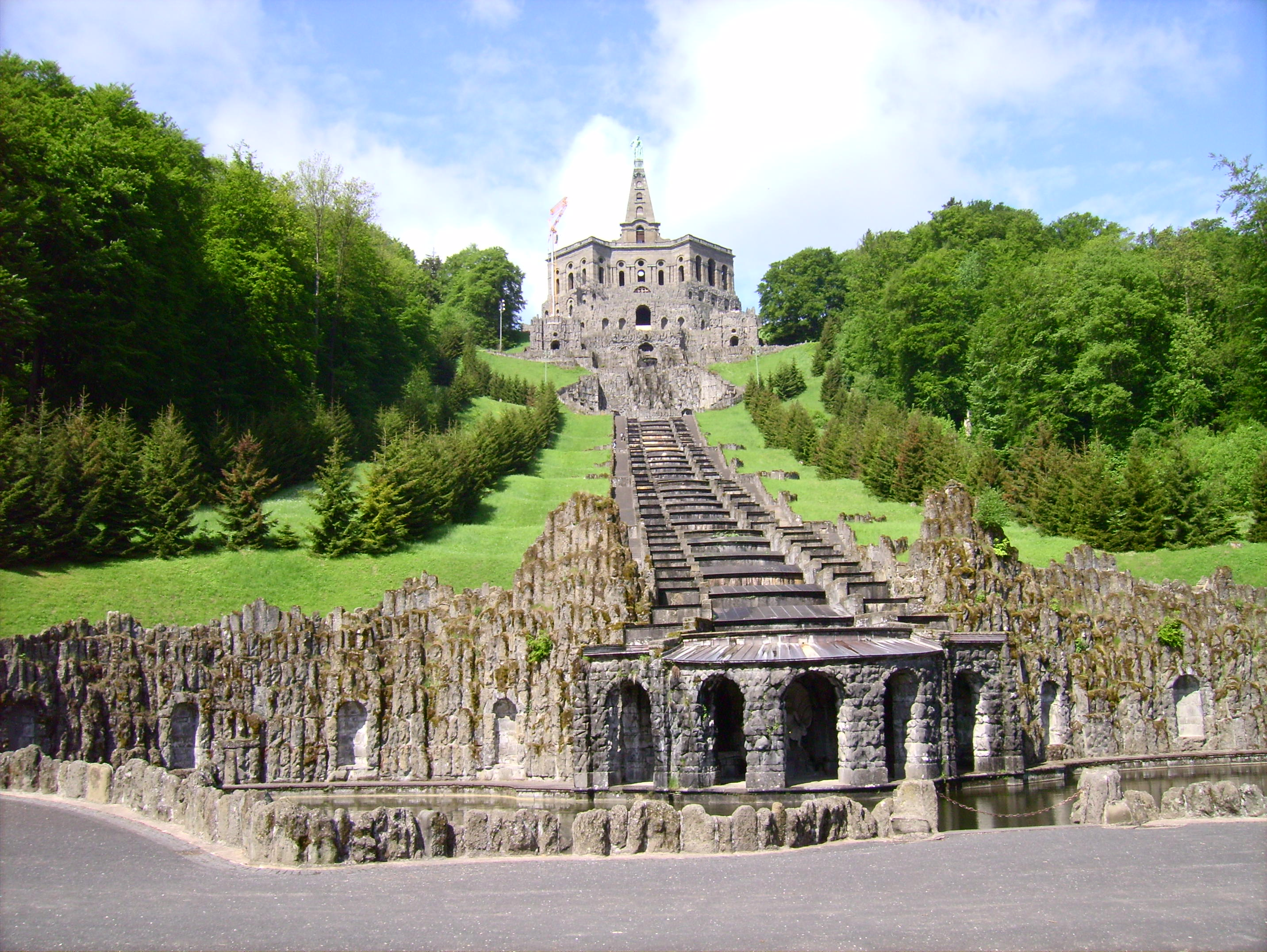 Kaskaden am Herkules, Kassel